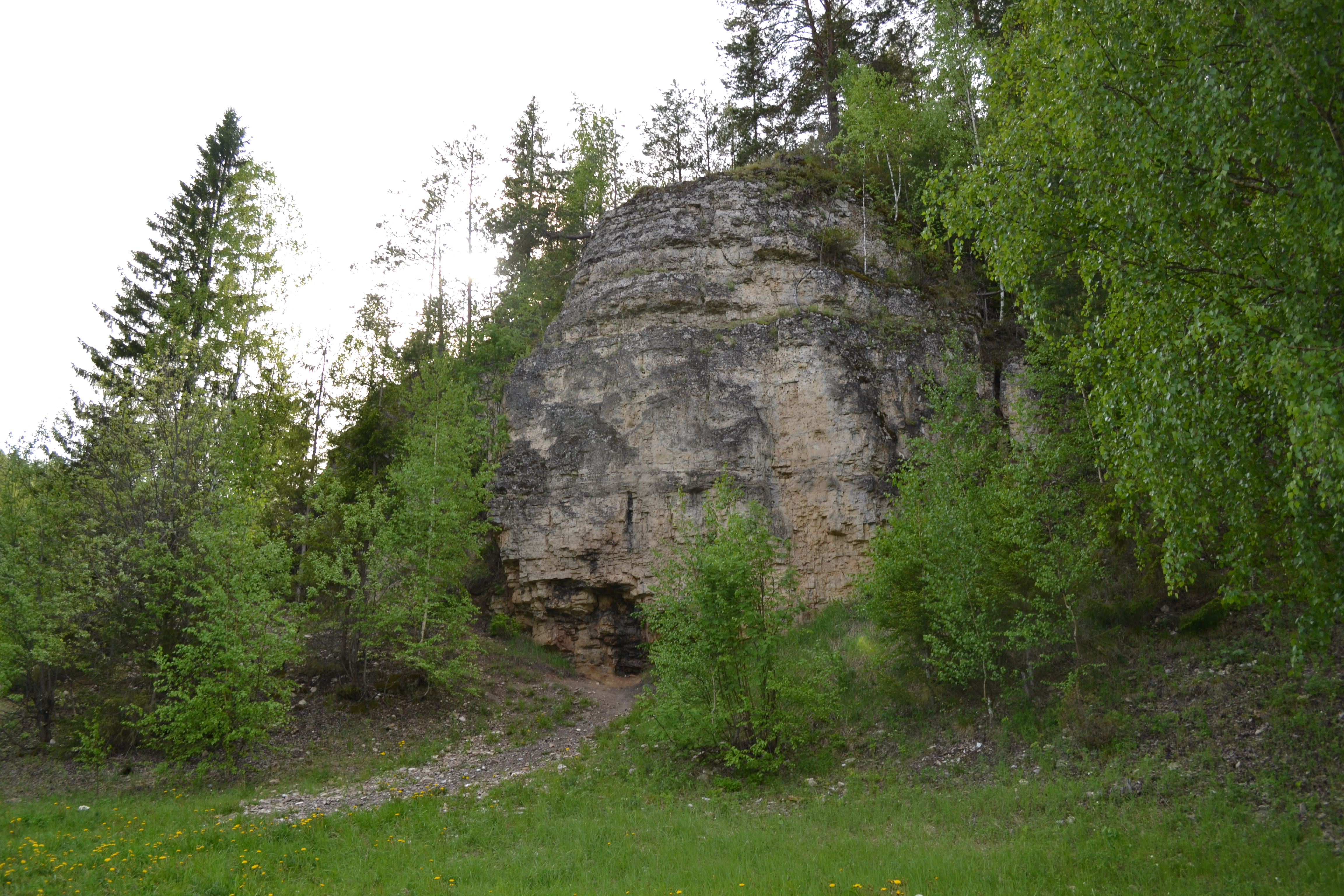 Береснятский ботанико-геологический комплекс, Советский район This image is related to the protected area of Russia number 4310236